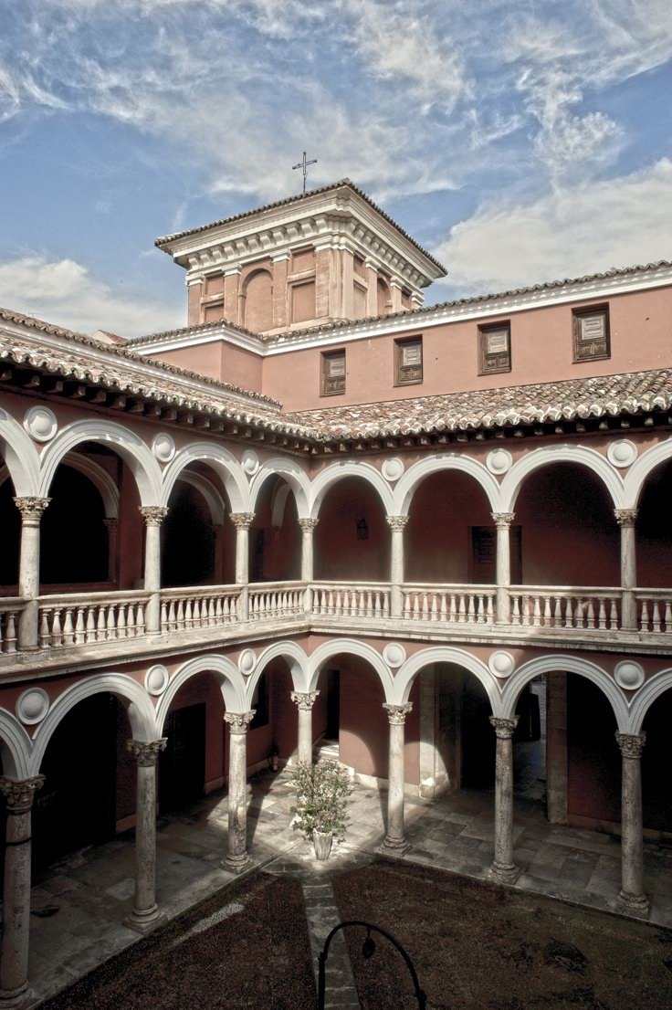 Vista del patio del Palacio de Fabio Nelli, sede del Museo de Valladolid, sobre el que sobresale una de las torres de su fachada